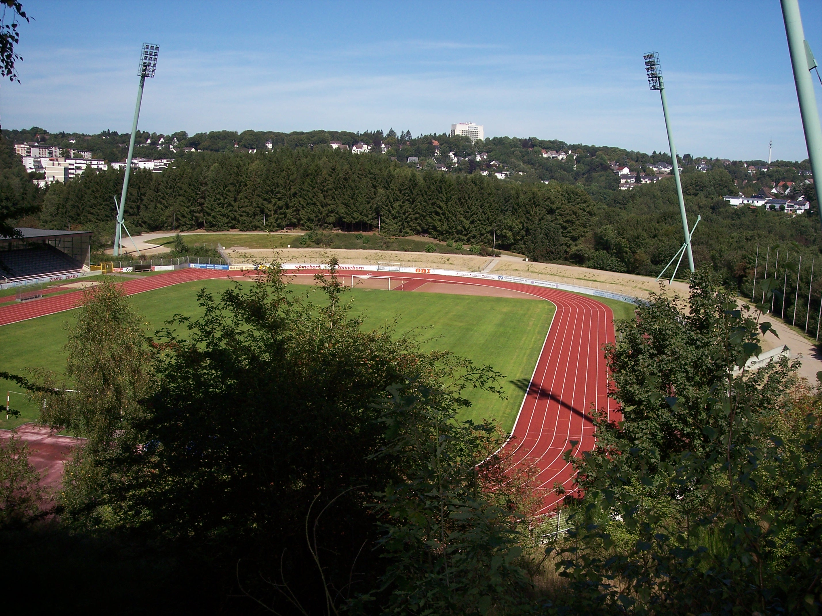 Lüdenscheid, Stadion Nattenberg von Süden, im Hintergrundin der Mitte das Hotel am Stadtpark